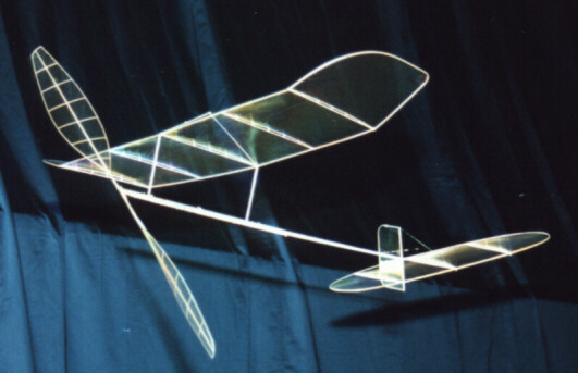 Description : Indoor Flyer F1d, Germany, 2005 Source : DAeC Date : 2005 Scanner : Vogelfrei